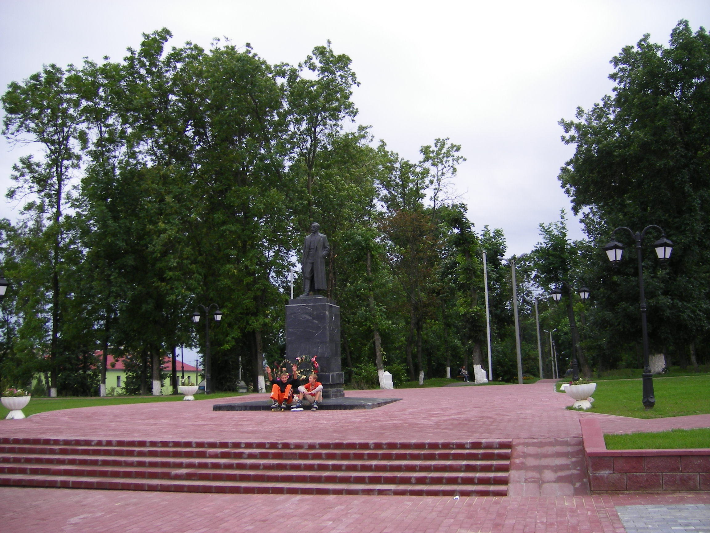 F.E.Dzerzsinszkij szobra a róla elnevezett belarusz városban.